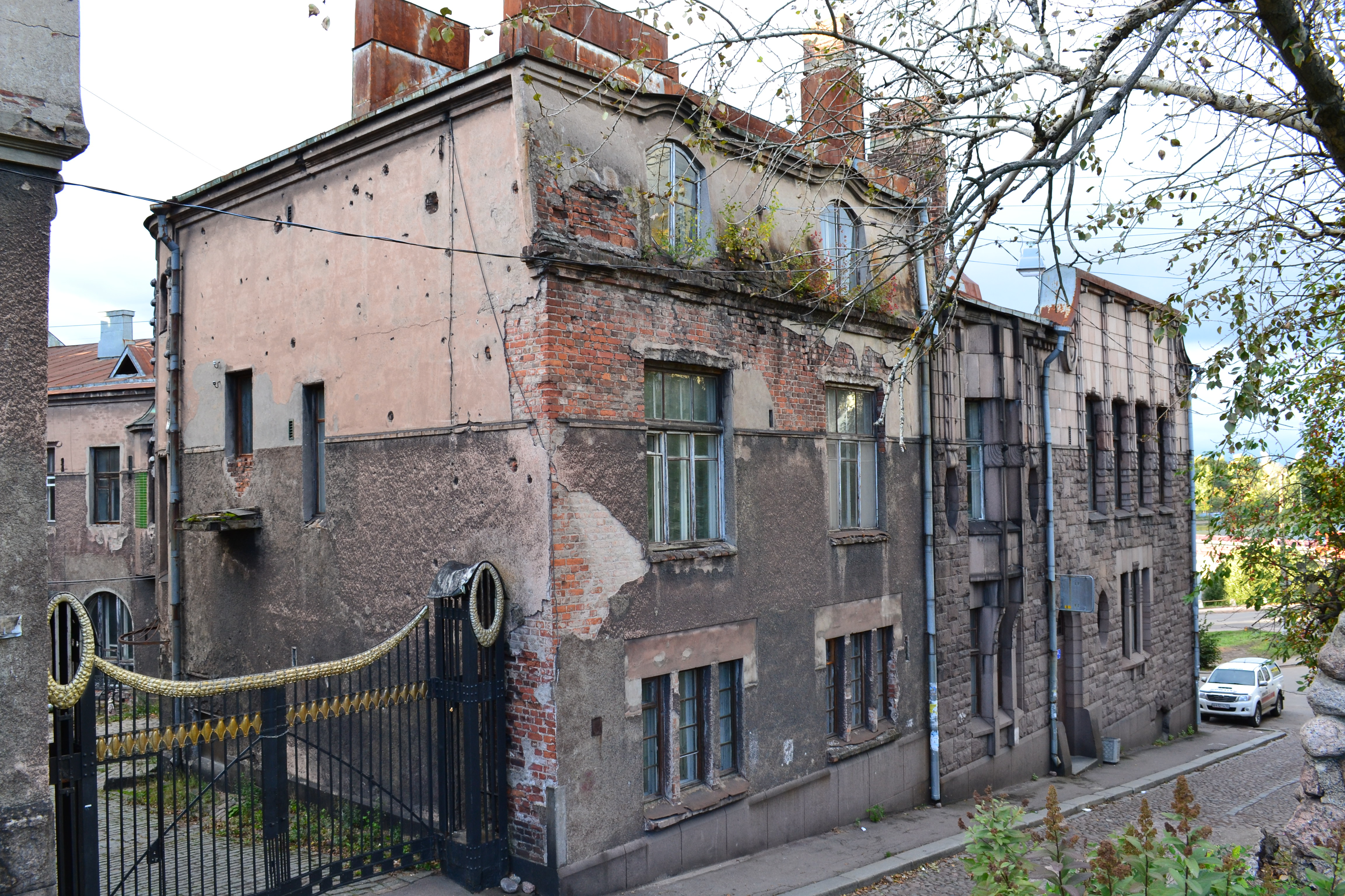 Здание фирмы хаакмен и к (Санкт-Петербург и Лен.область, Выборг, подгорная улица, 14, северный вал, 5)